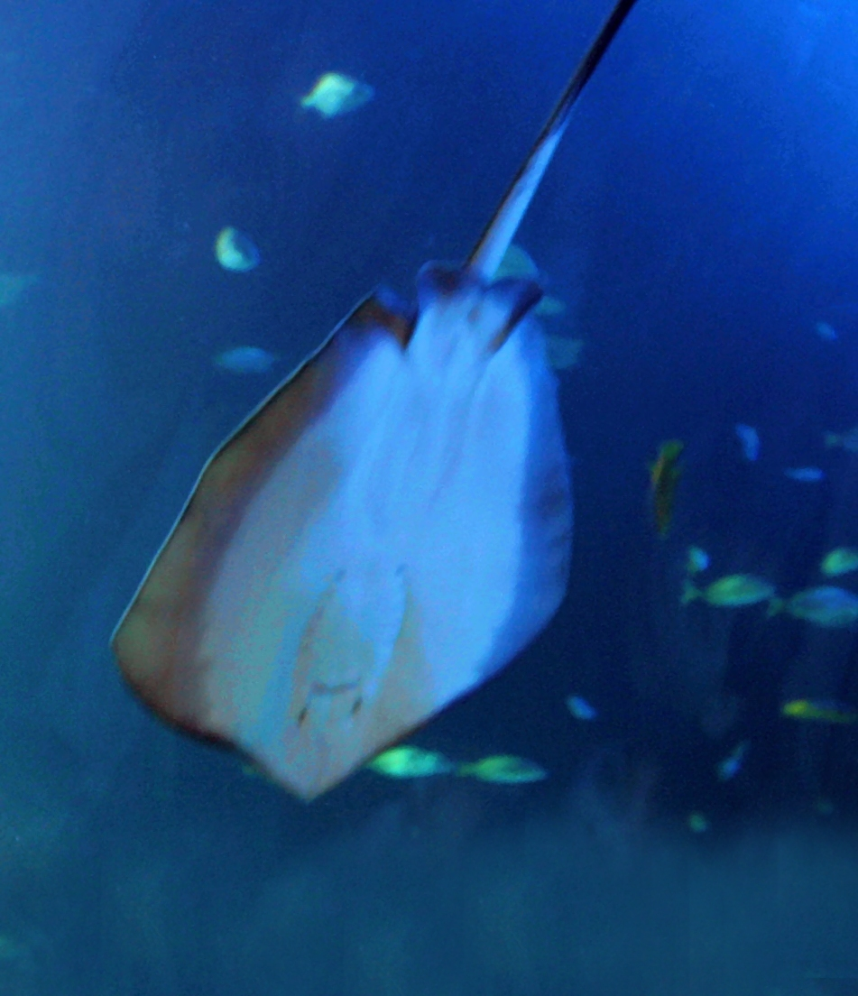 Erste Besucher